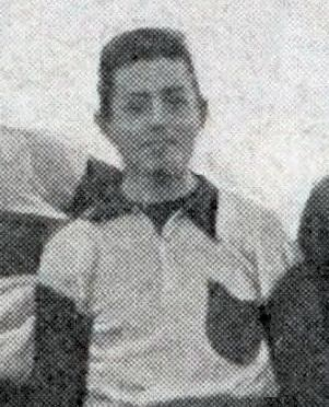 Fernand Canelle en 1896 (Club français), champion de France UFSFA à 14 ans.